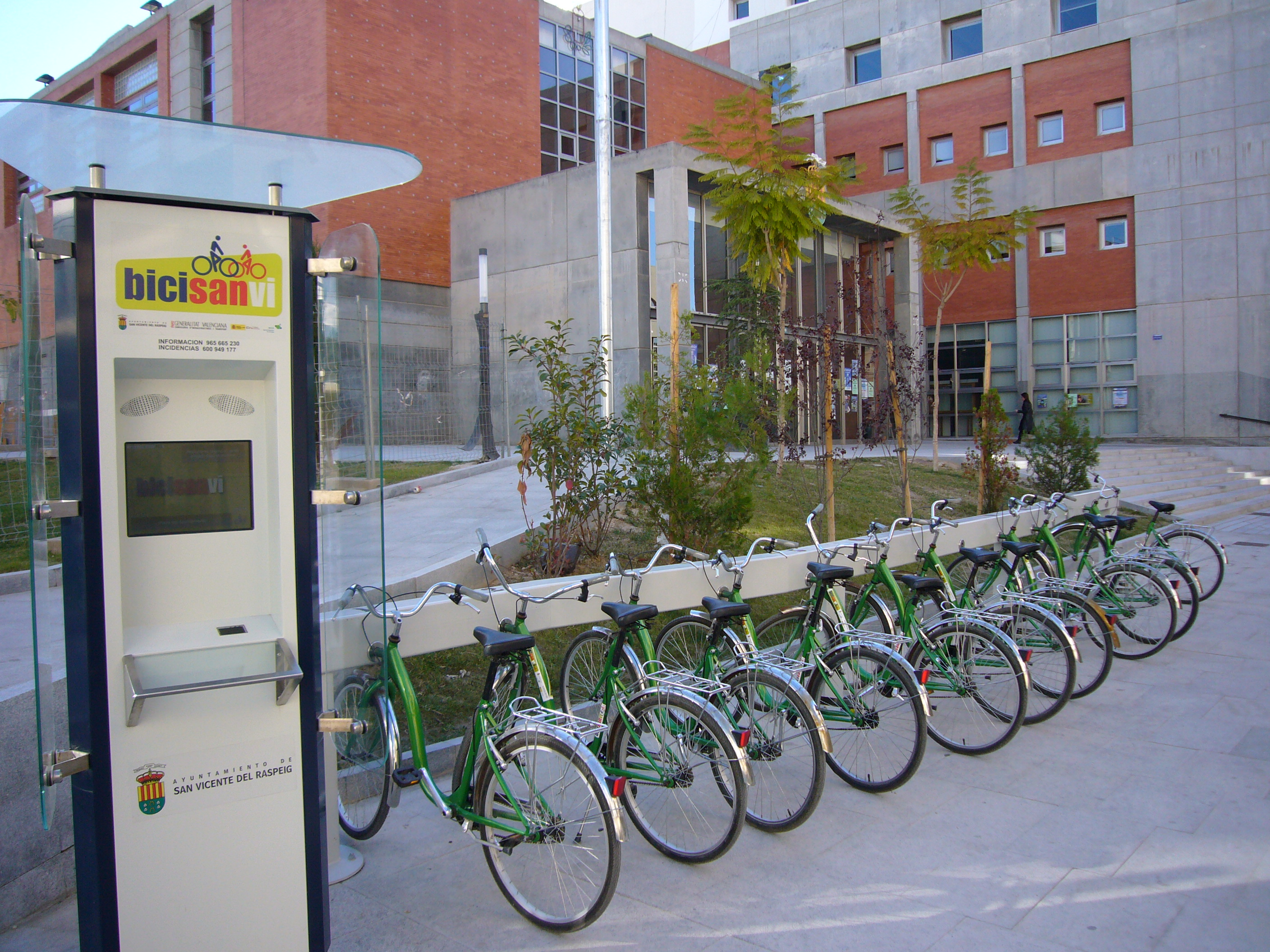 Punto de recogida de Bicisanvi situado entre el conservatorio municipal y el nuevo ayuntamiento.